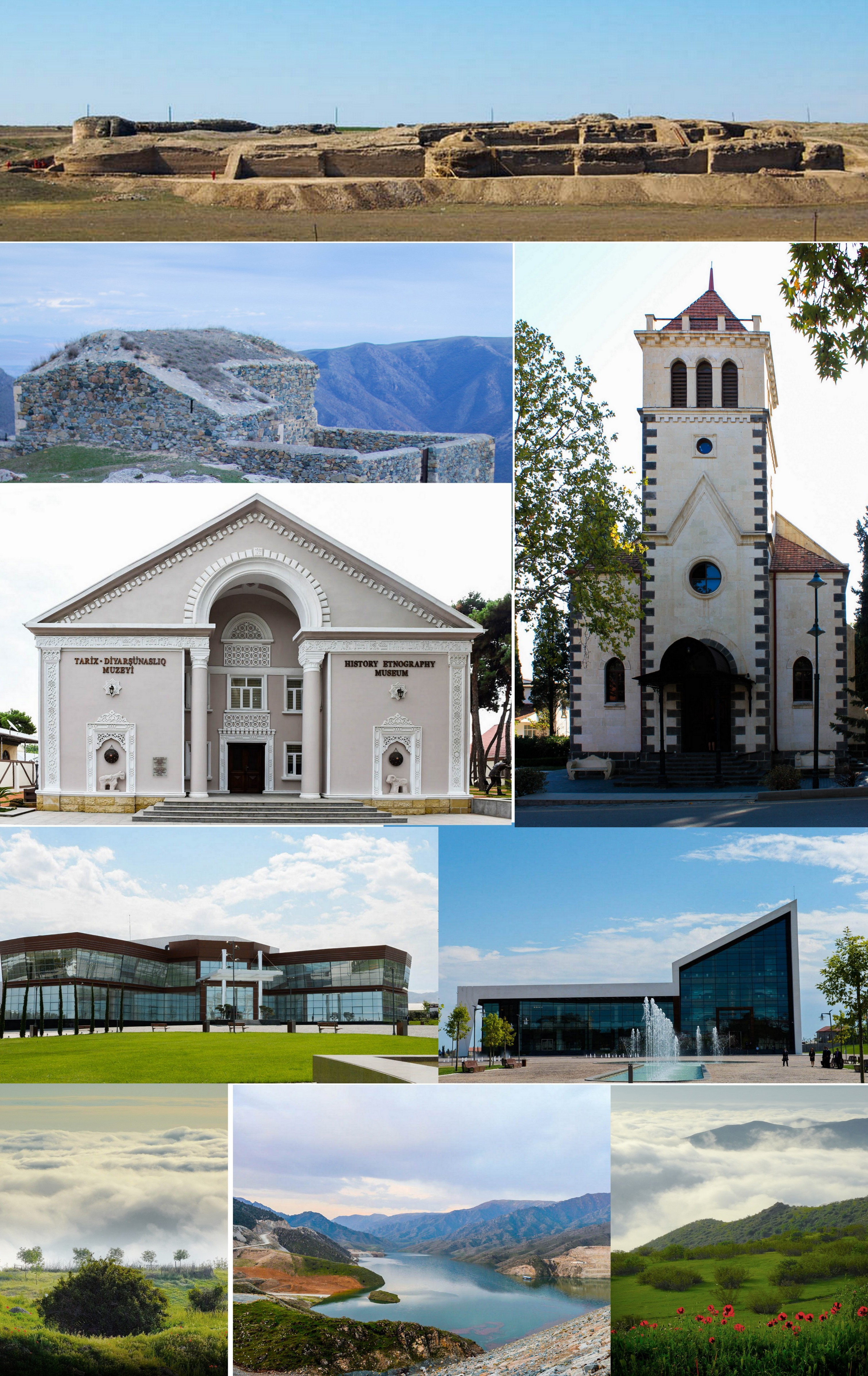 Montage of pictures of Şəmkir used for the specific article. Composition of these pictures: File:Şəmkirdə Heydər Əliyev Mərkəzi.jpg File:Şəmkirdə Zəka İntellektual Gənclər Mərkəzi.jpg File:Şəmkirçay su anbarı.jpg File:Şəmkir Tarix-Diyarşünaslıq Muzeyi.jpg File:Shamkir fortress.jpg File:Irmaşlichurch.jpg File:Şəmkir təbiəti (2).jpg File:Şəmkir təbiəti (1).jpg File:Deutsche Lutherische Kirche in Shamkir.jpg